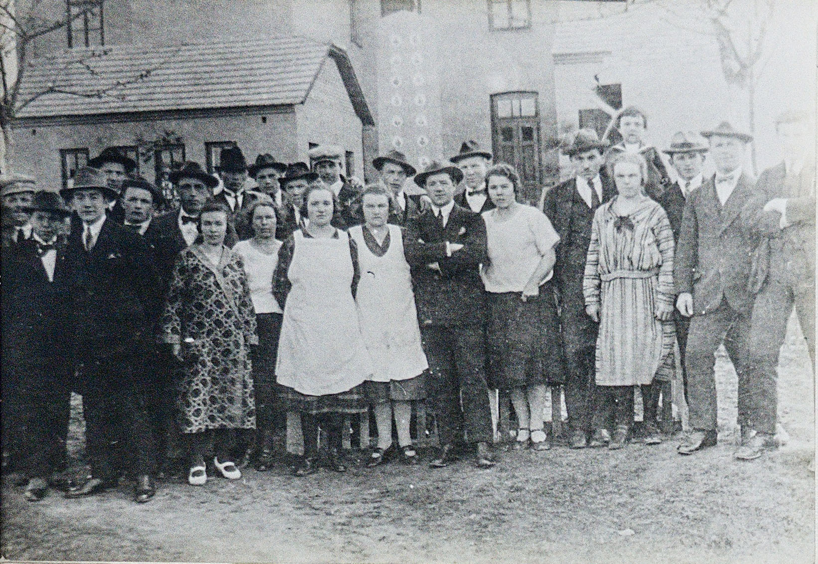 Zaběhlá, skupina mladých lidí stojí u pomníku obětem 1. světová války před budovou školy, 1926